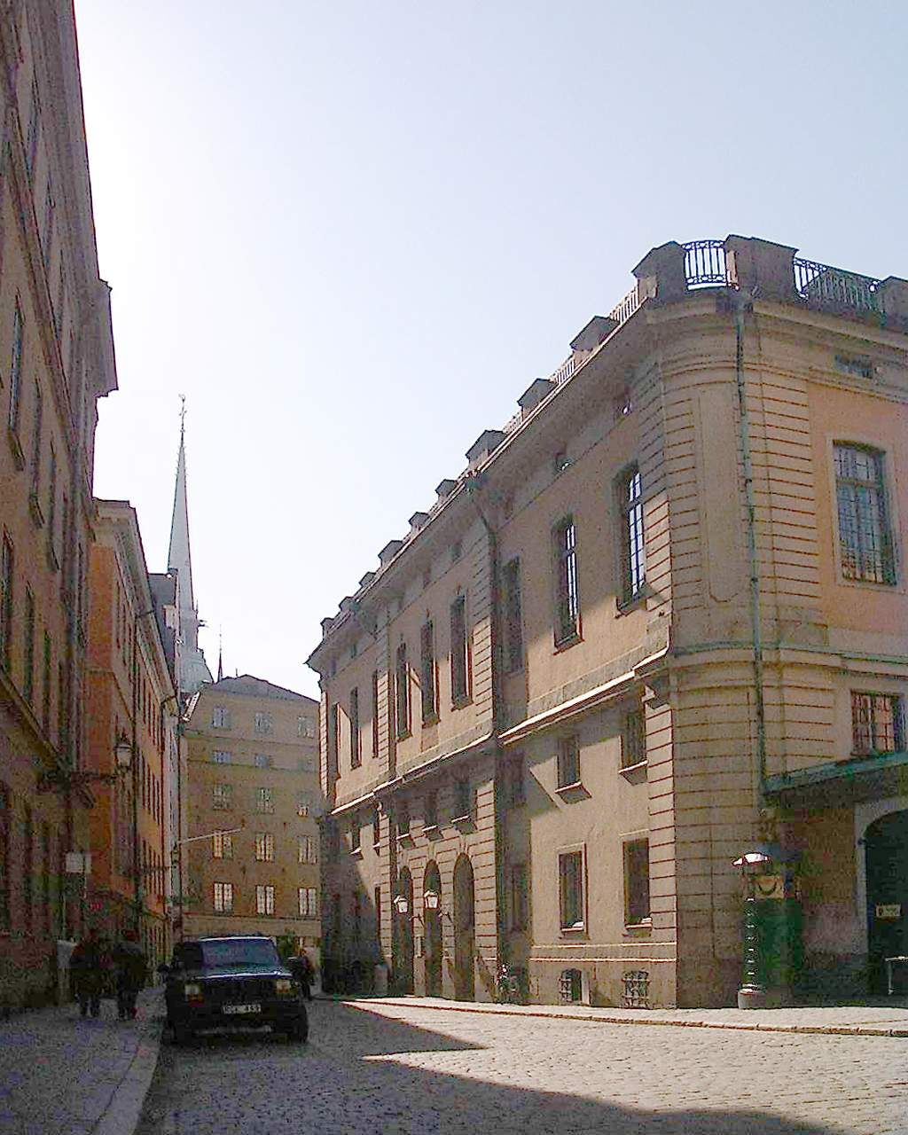 Façade of the Stockholm Stock Exchange Building at Källargränd, Gamla stan, Stockholm. Rotated, cropped; light, perspective adjusted.